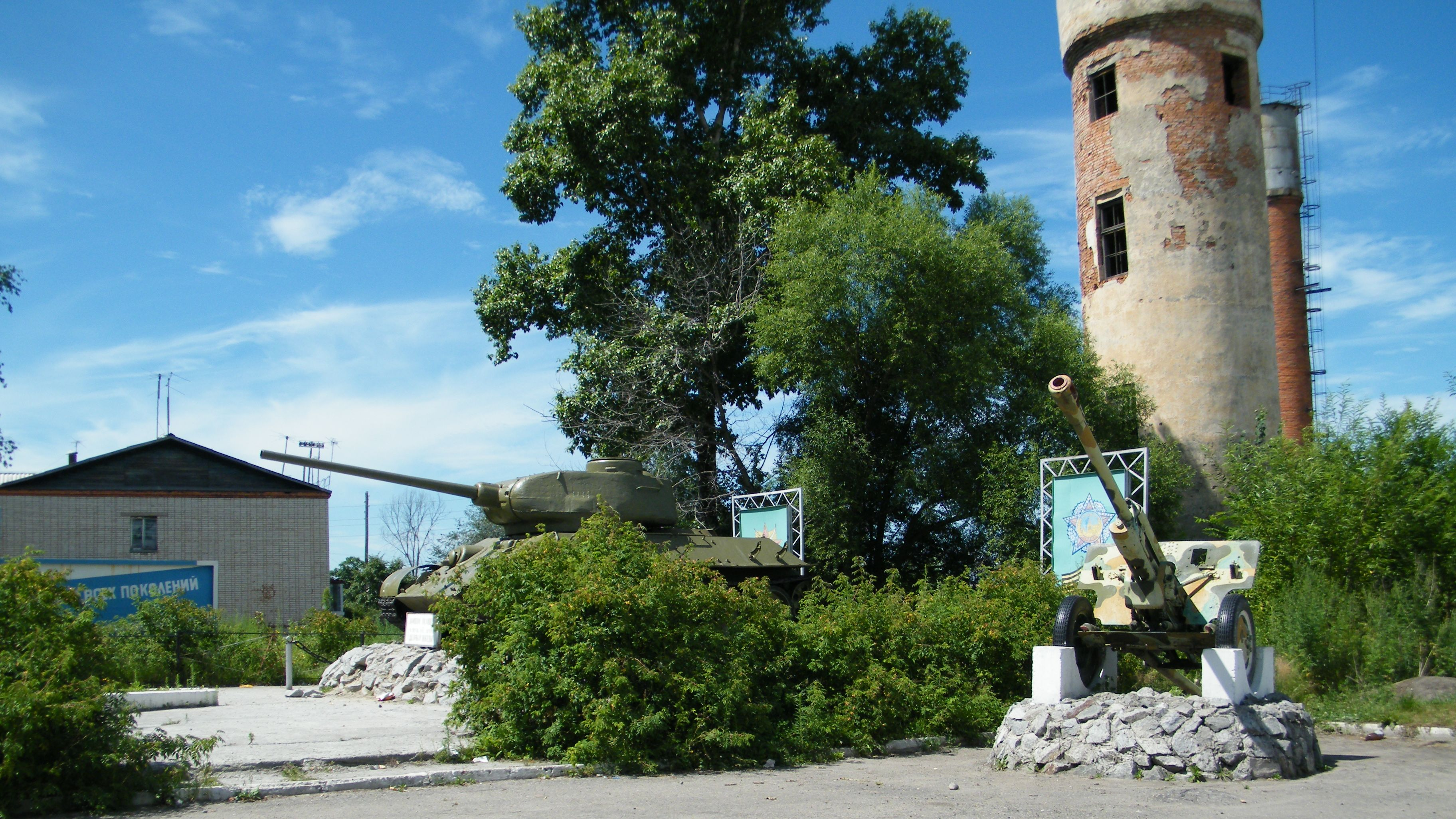 Хабаровский край Переяславка перед военкоматом 2012 год